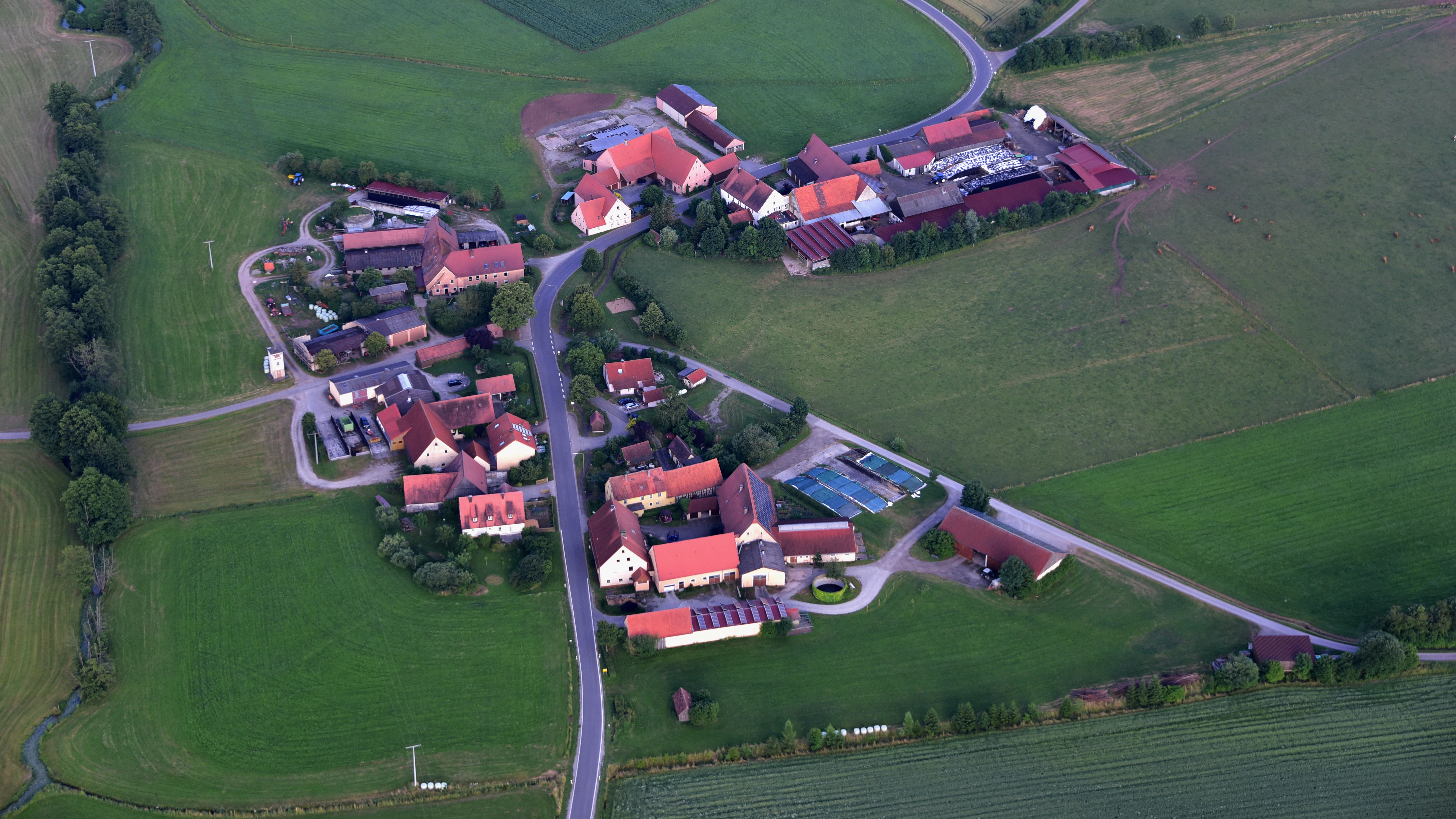 Clonsbach, Luftaufnahme (2016)